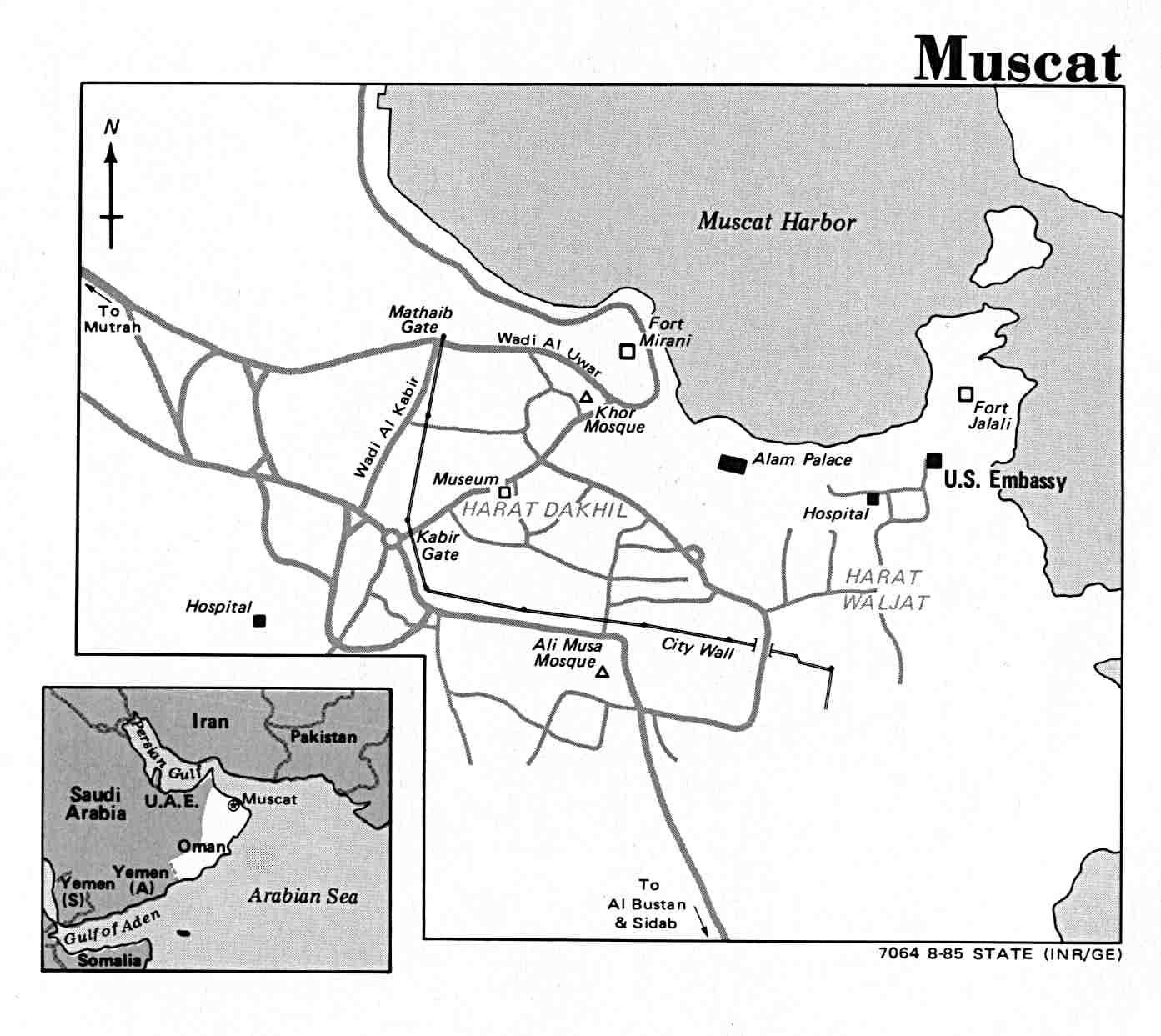 Muscat map, 1985